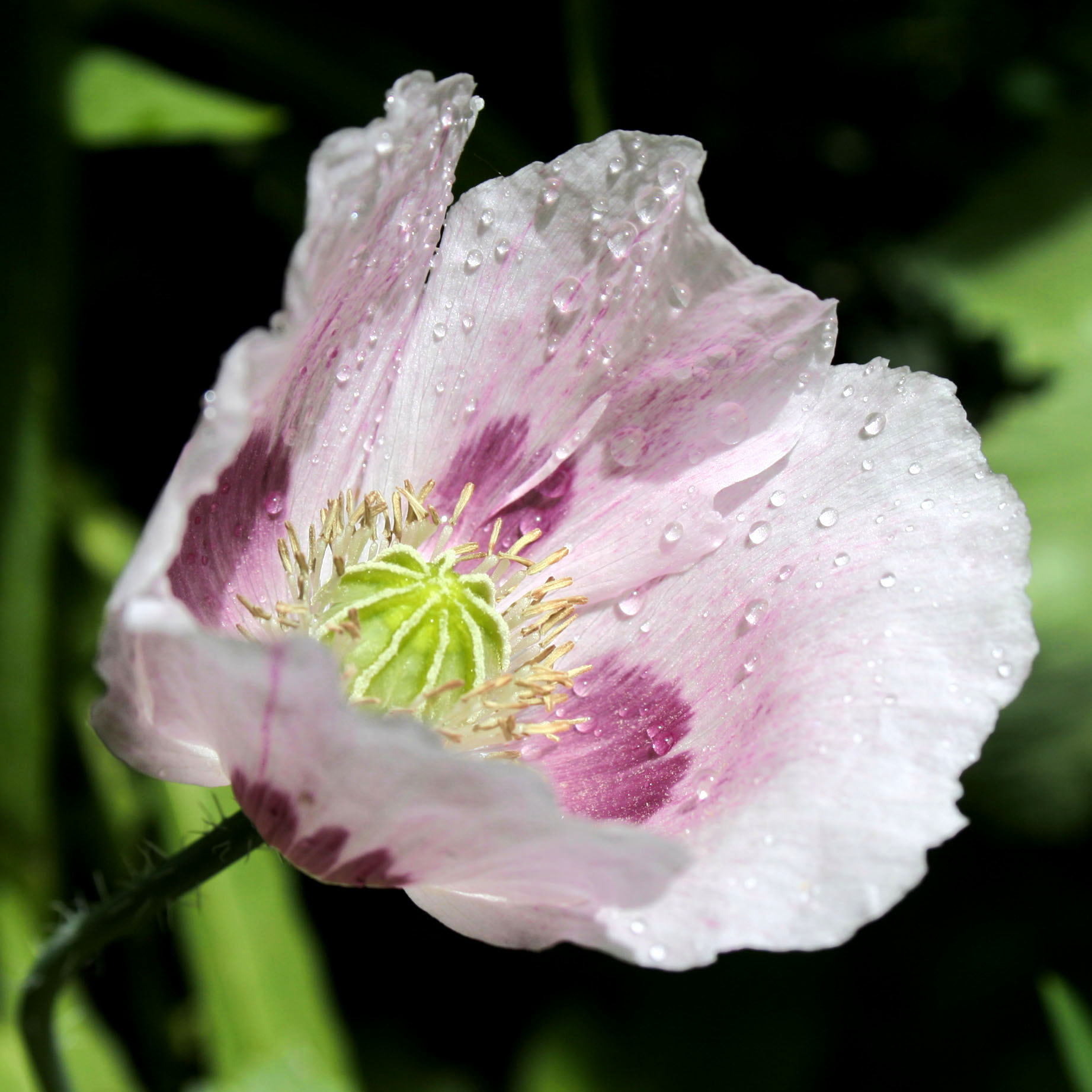 Mák virága Makón